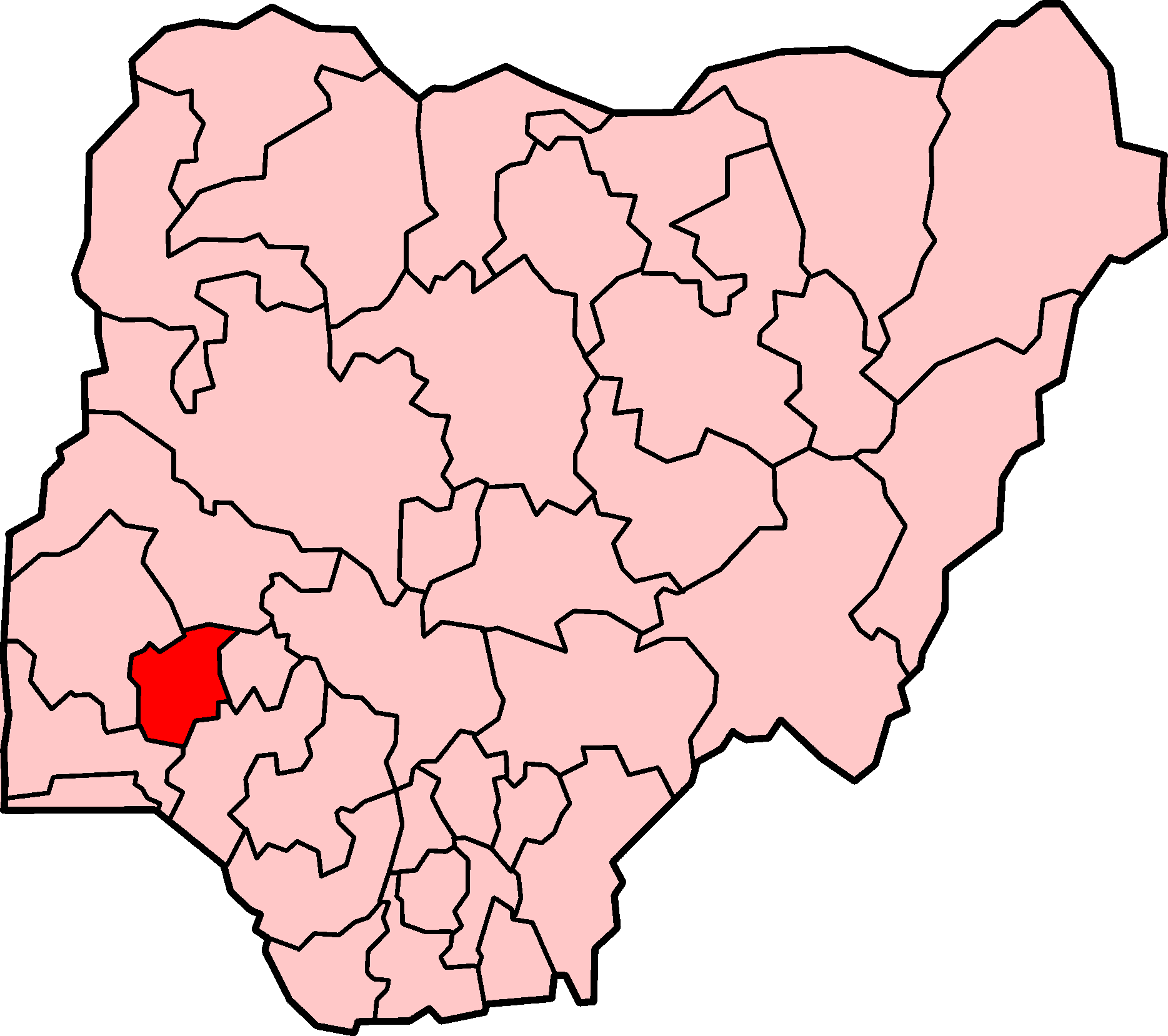 Localização de Osún na Nigéria.